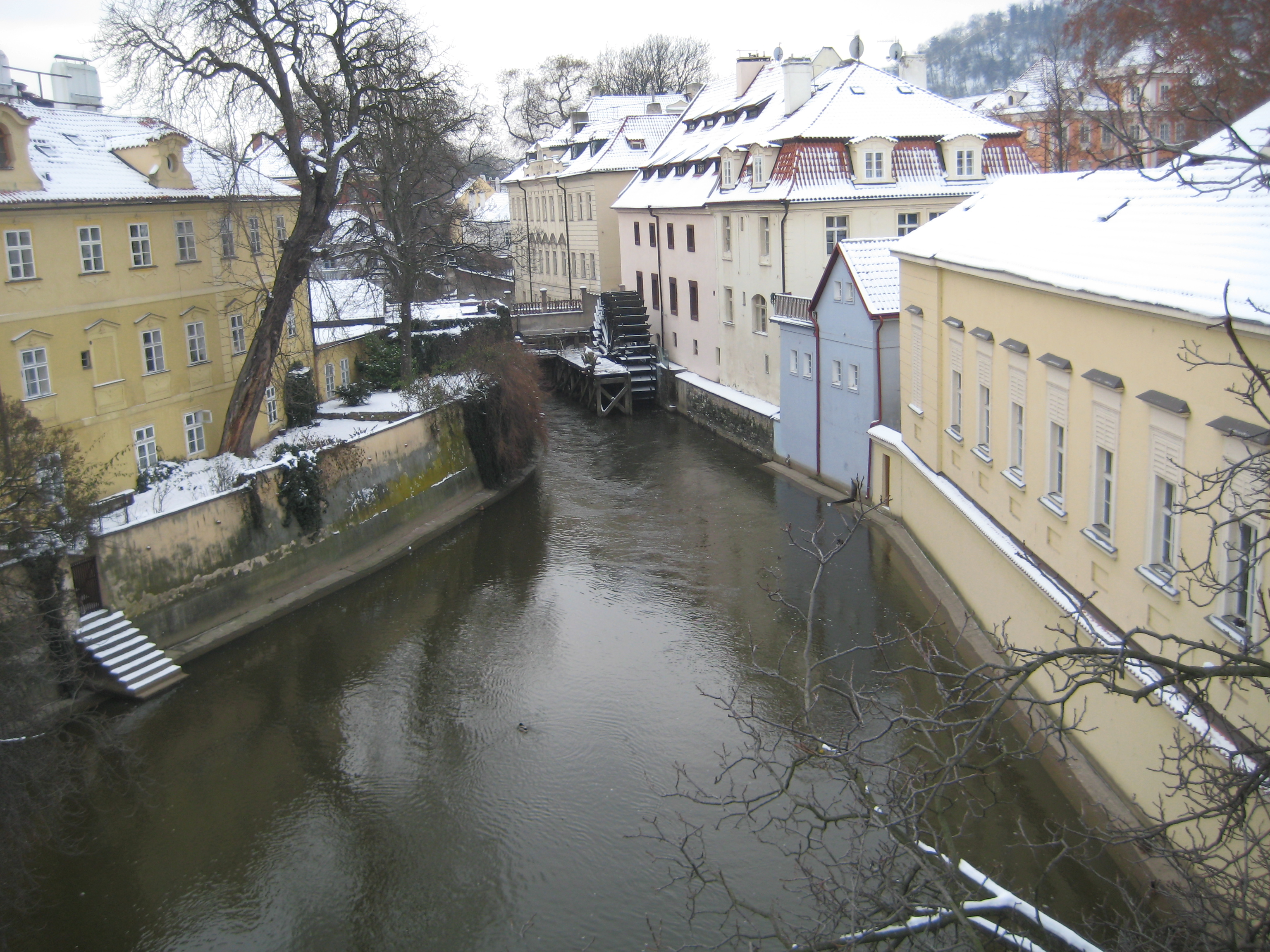 Čertovka